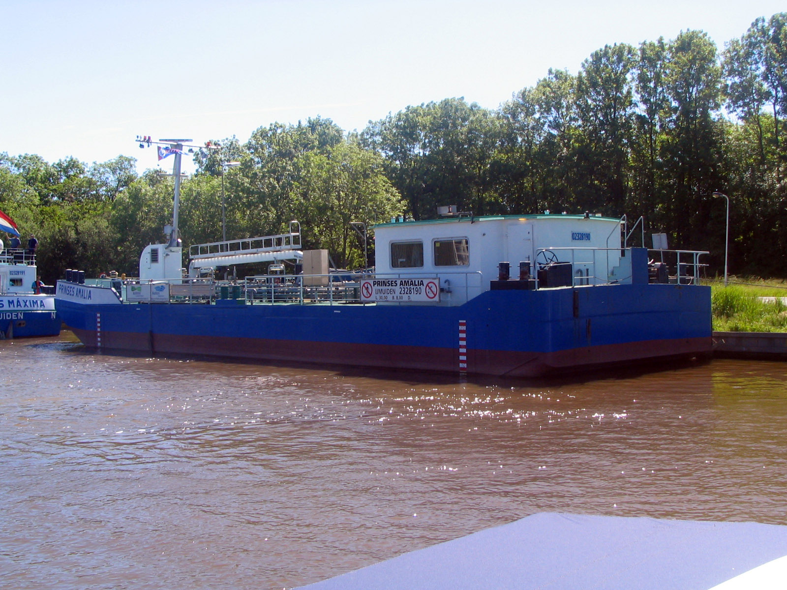 Schulschiff Prinses Amalia